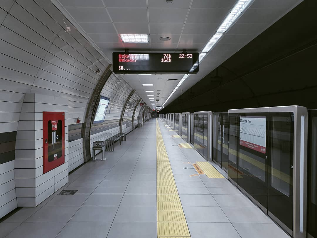 Üsküdar metro hattı istasyon içi görüntüsü